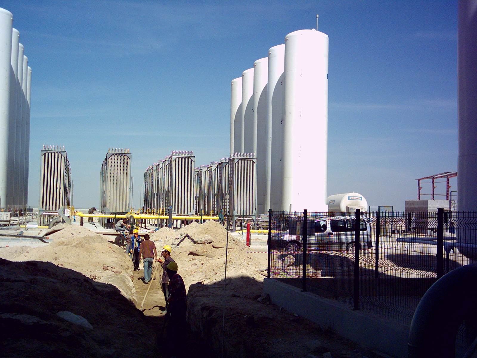 LNG Tankları MB Şeker Şimdi Doğalgaz a geçti. Tanklar söküldü.(Balküpü)